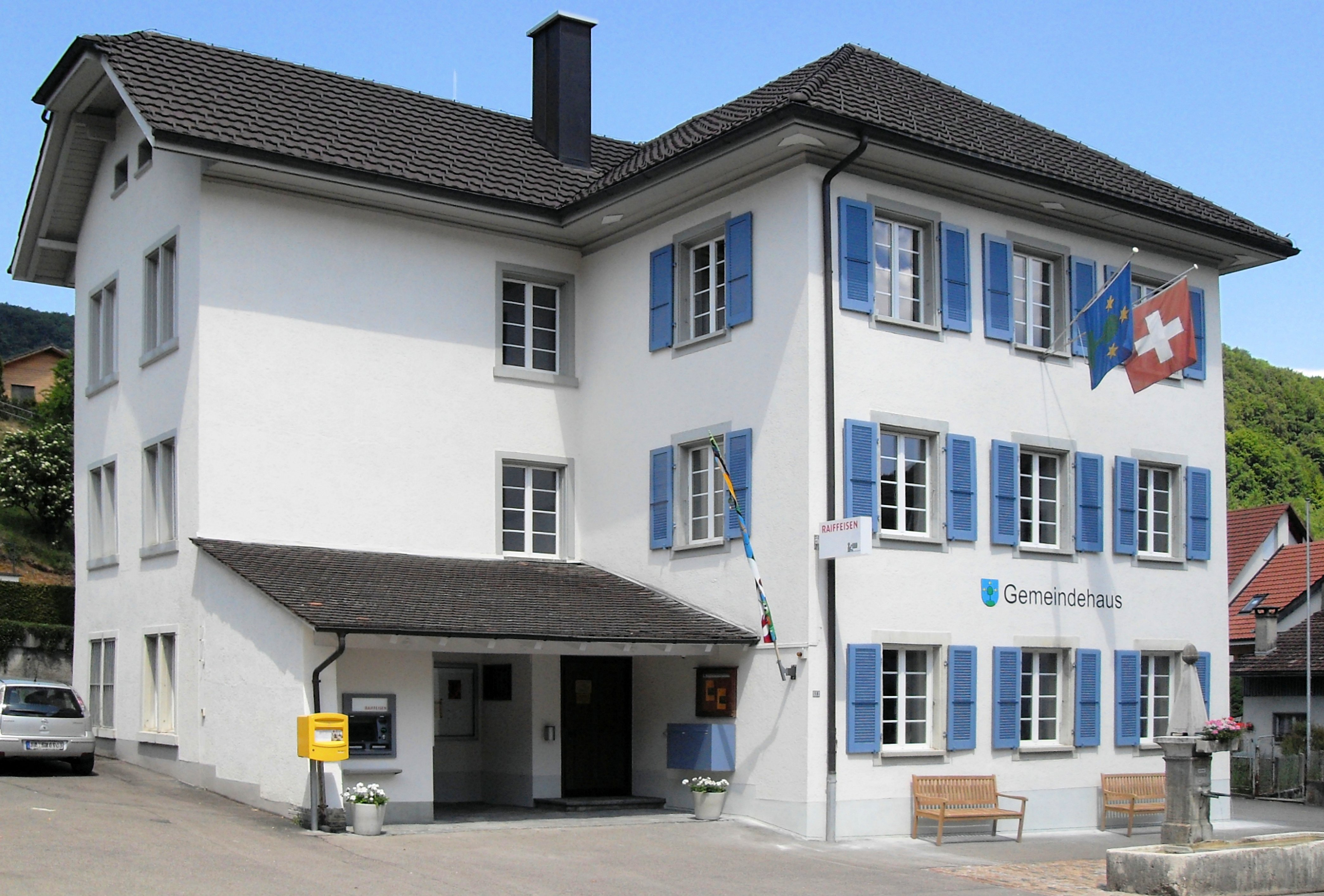 Gemeindehaus Büren, Kanton Solothurn, Schweiz